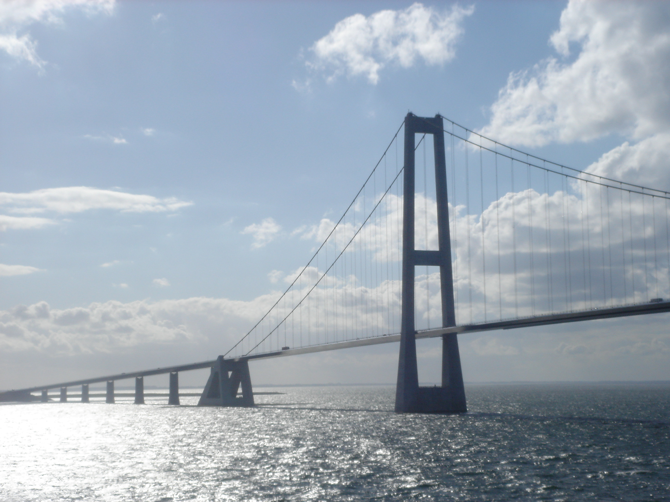 Storebæltsbroen sett fra MS Prinsesse Ragnhild (Color Line-ruten Oslo-Kiel)